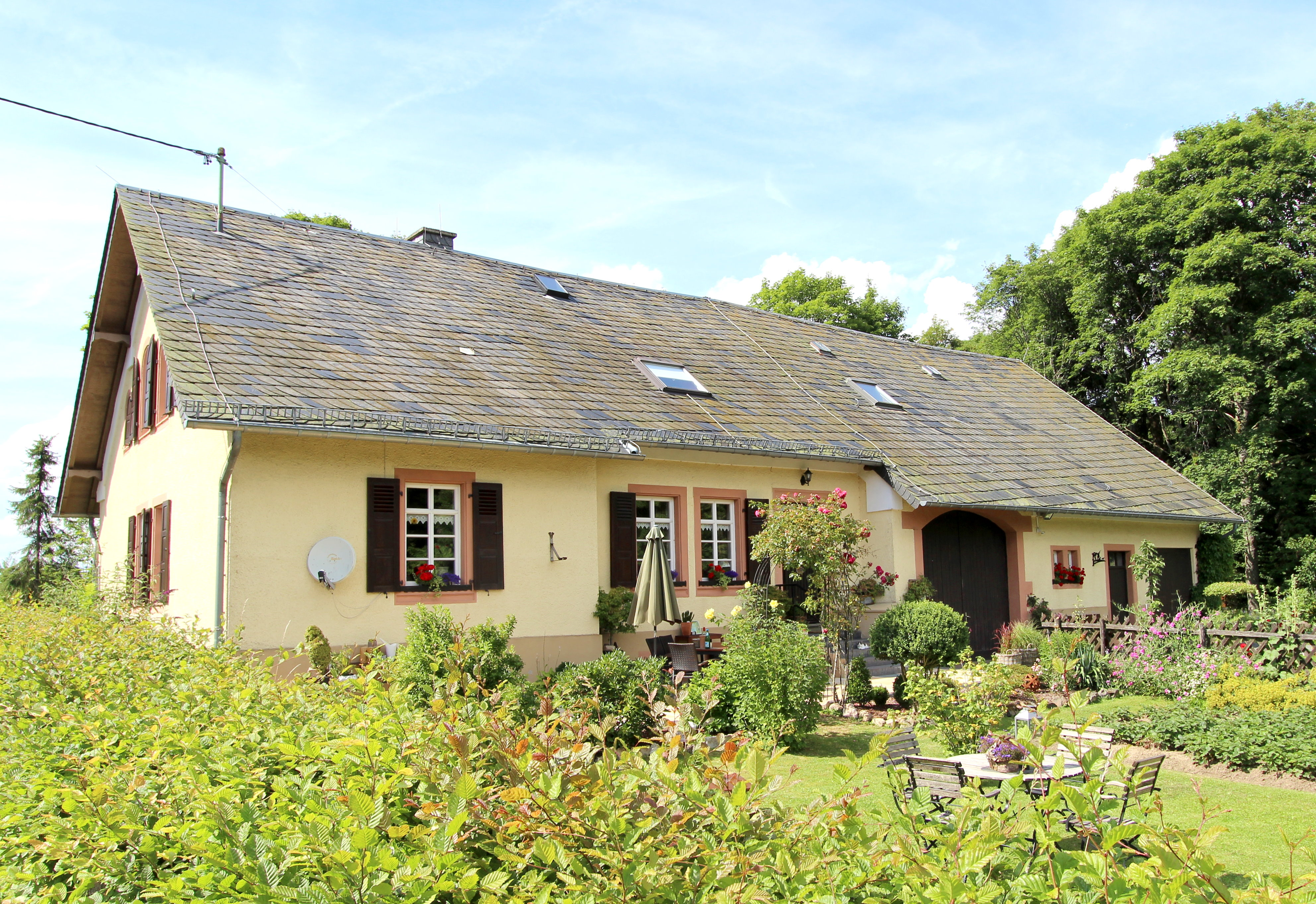 54597 Roth bei Prüm, nordöstlich des Ortes. An der Kreuzung B 265 und der L 20 in Richtung Ormont. Eingeschossiges Quereinhaus, 1868. Aufnahme von 2017.